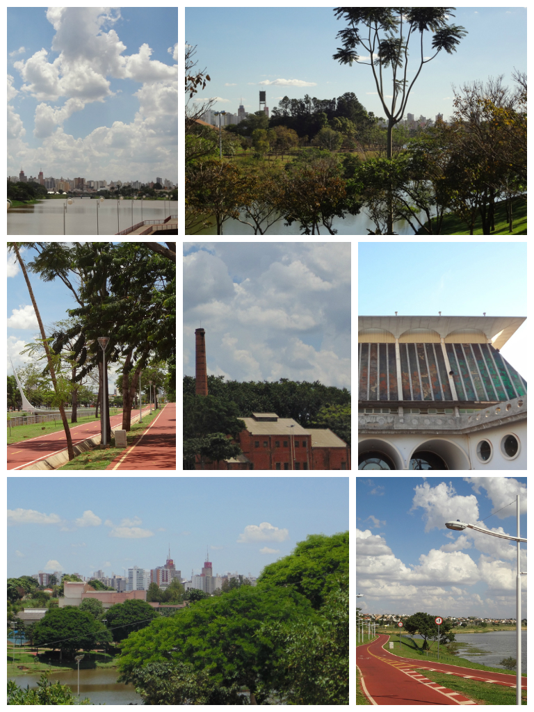 Colagem de fotos da cidade de São José do Rio Preto, SP